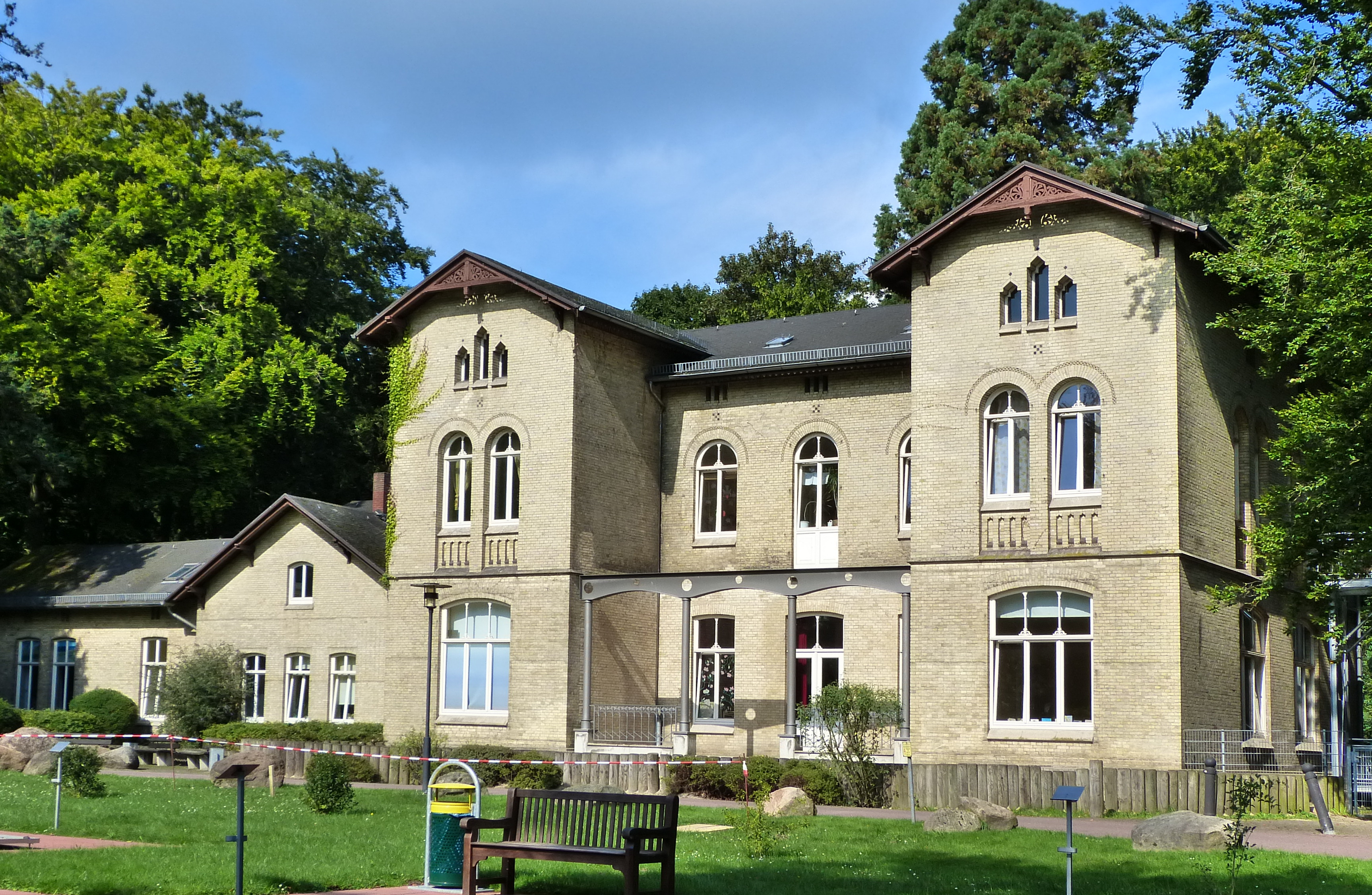 Haus Blumenkamp in Bremen, Billungstraße 23Das abgebildete Objekt ist ein geschütztes Kulturdenkmal in der Freien Hansestadt Bremen, mit der Nr. 2092 beim Landesamt für Denkmalpflege registriert.